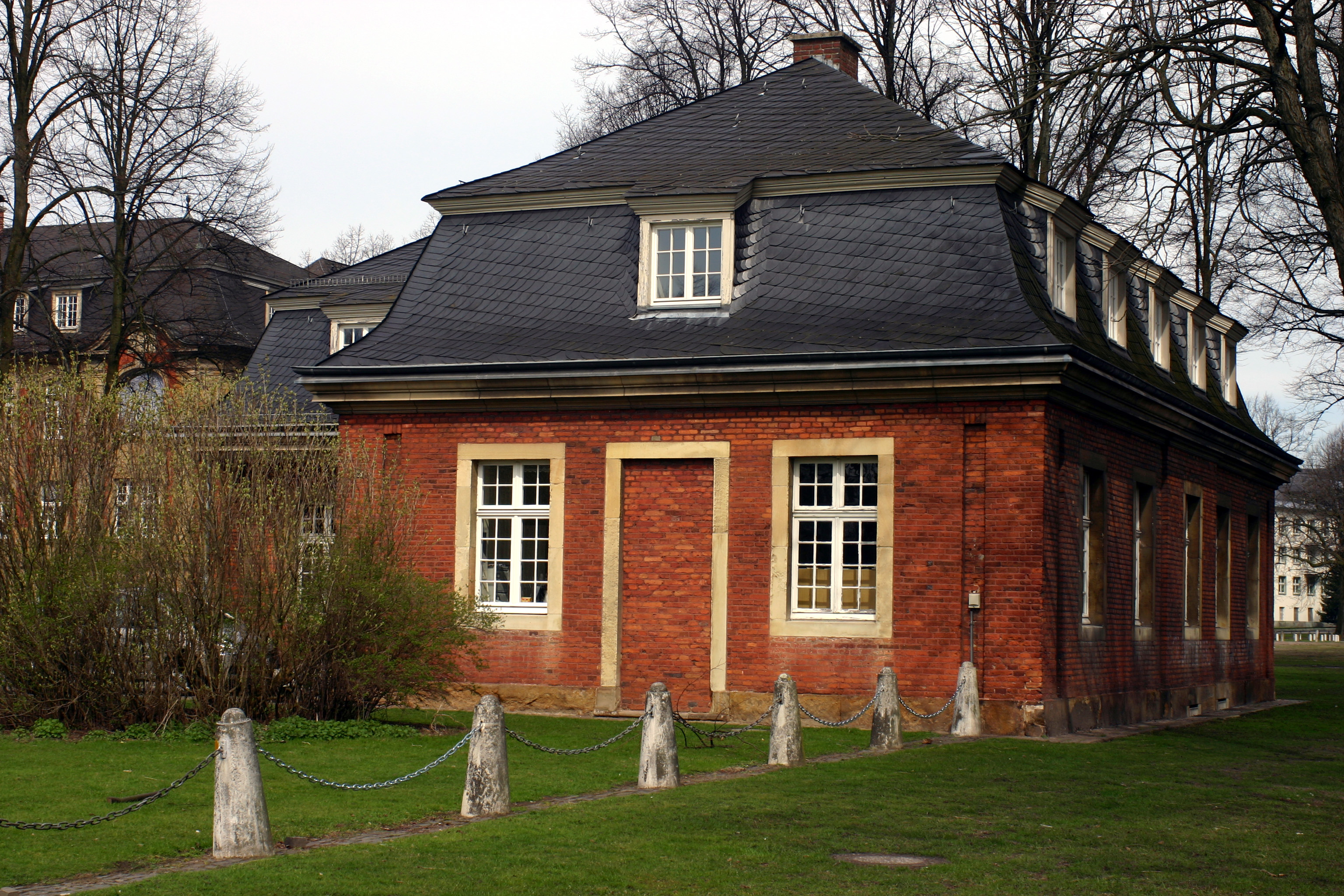 rechtes Kavalliershäuschen vor dem Schloß in Münster - Sitz des Instituts für Musikwissenschaft und Musikpädagogik der Westfälische Wilhelms-Universität Münster